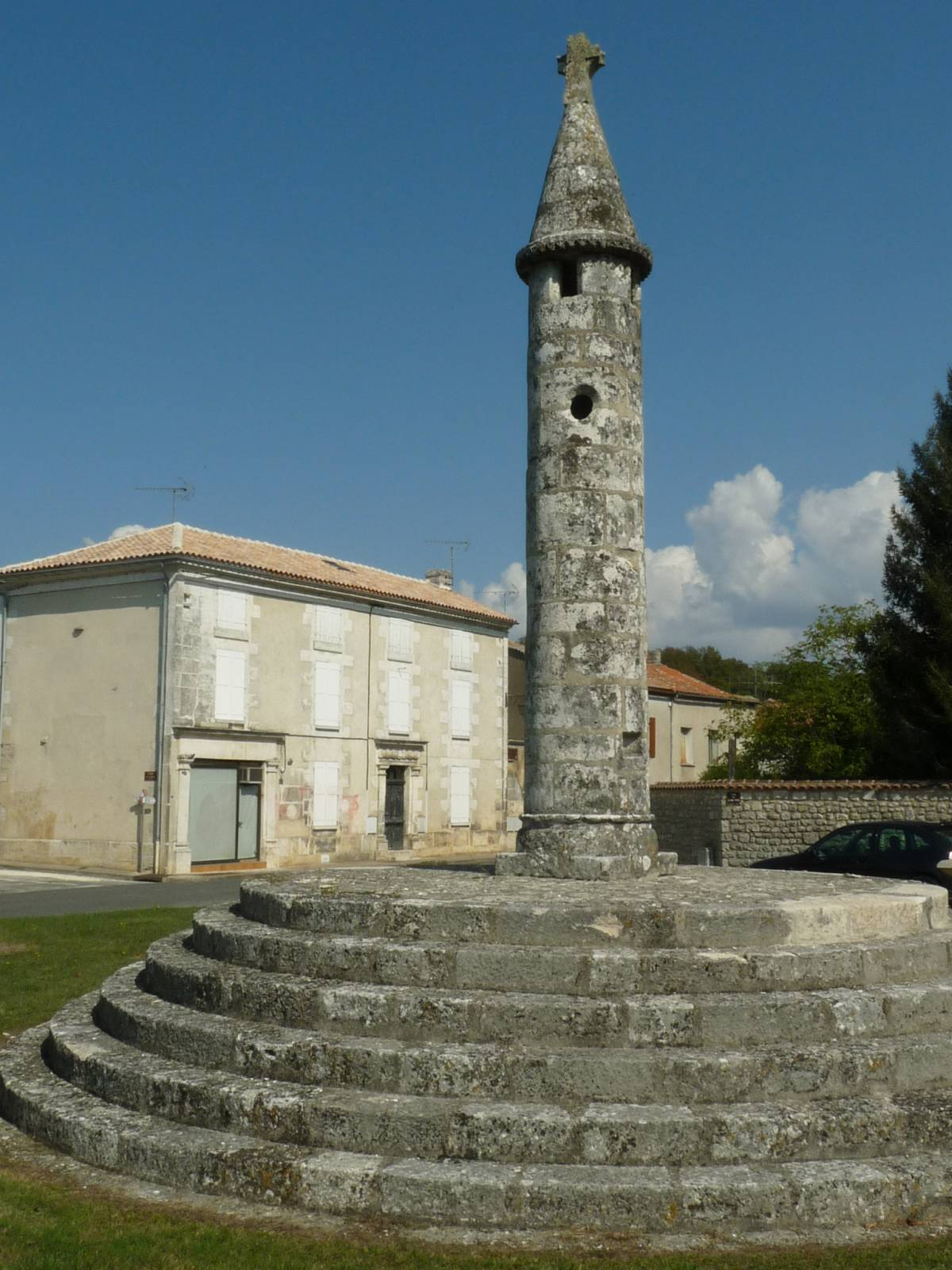 lanterne des morts de Pranzac (16), France